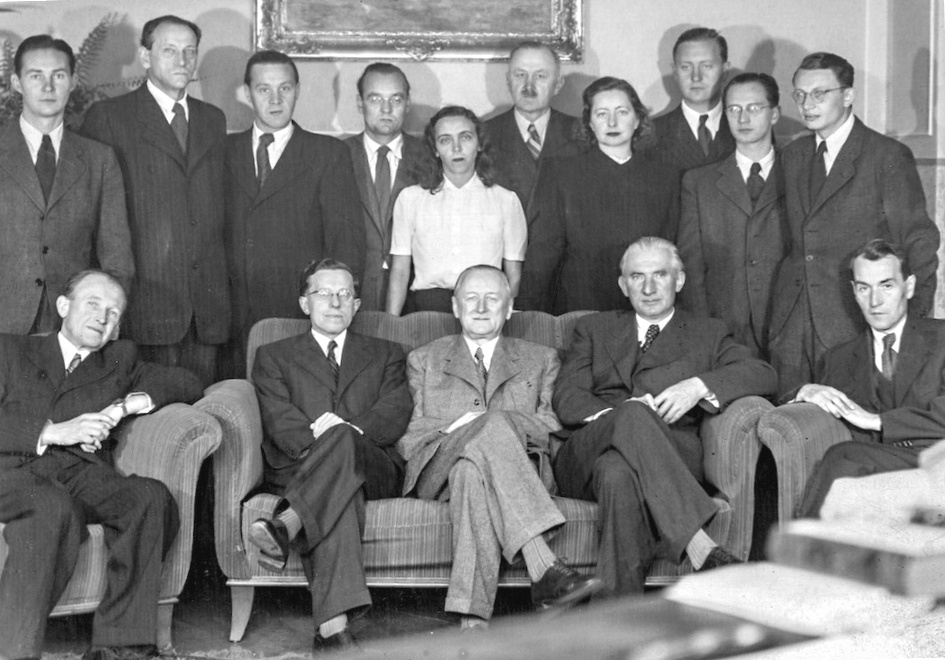 Státní stomatologický ústav, 40. léta (datum na scanu je hrubý odhad)